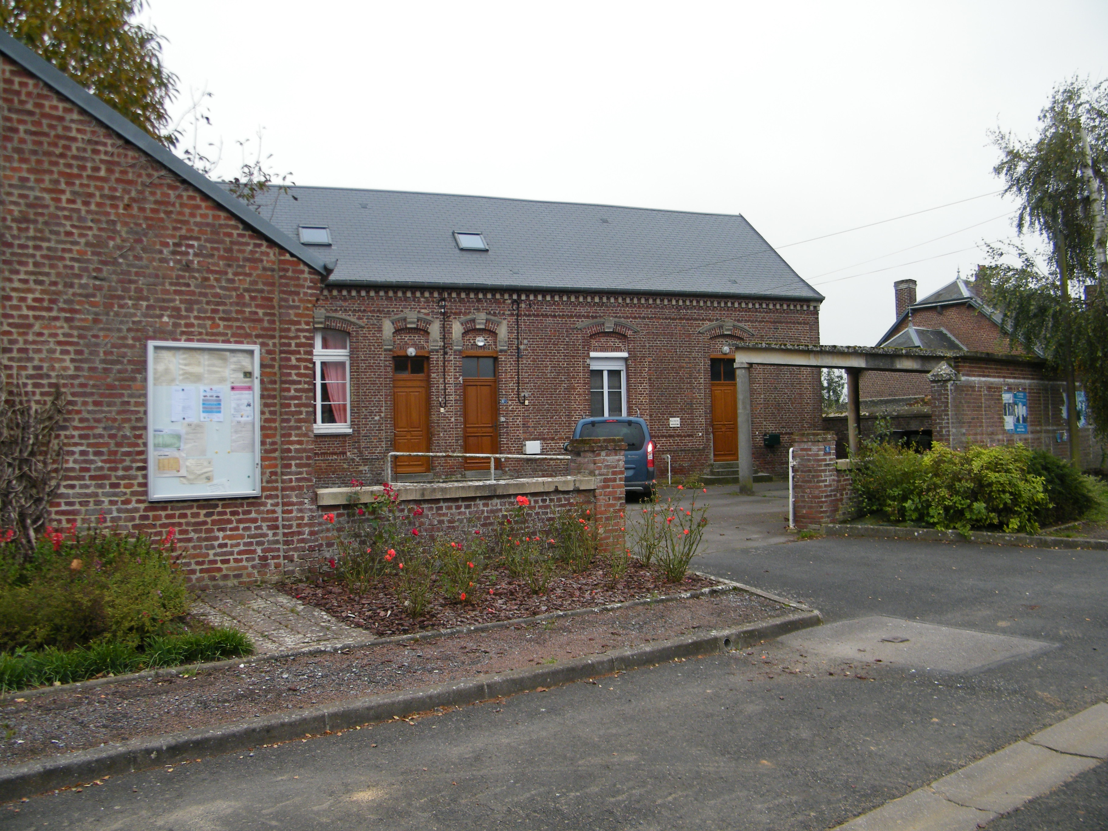 Bâtiments communaux.